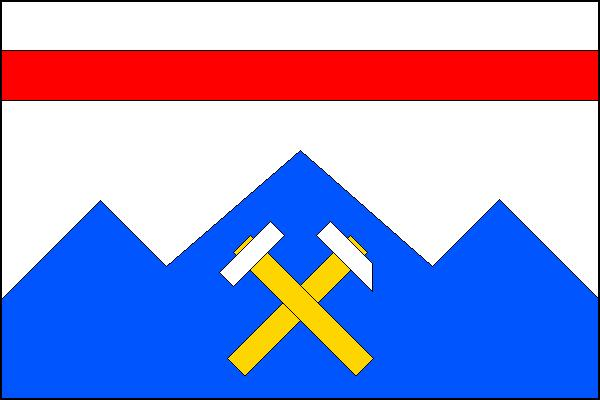 Česky: vlajka obce Horní Kalná